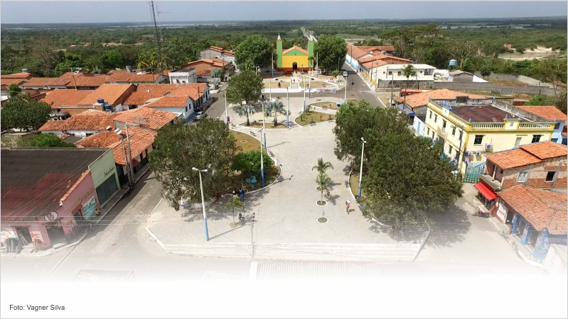 Foto da praça Presidente Kennedy em Monção. Vista frontal da Paróquia São Francisco Xavier. Ao lado direito o prédio da prefeitura Municipal.